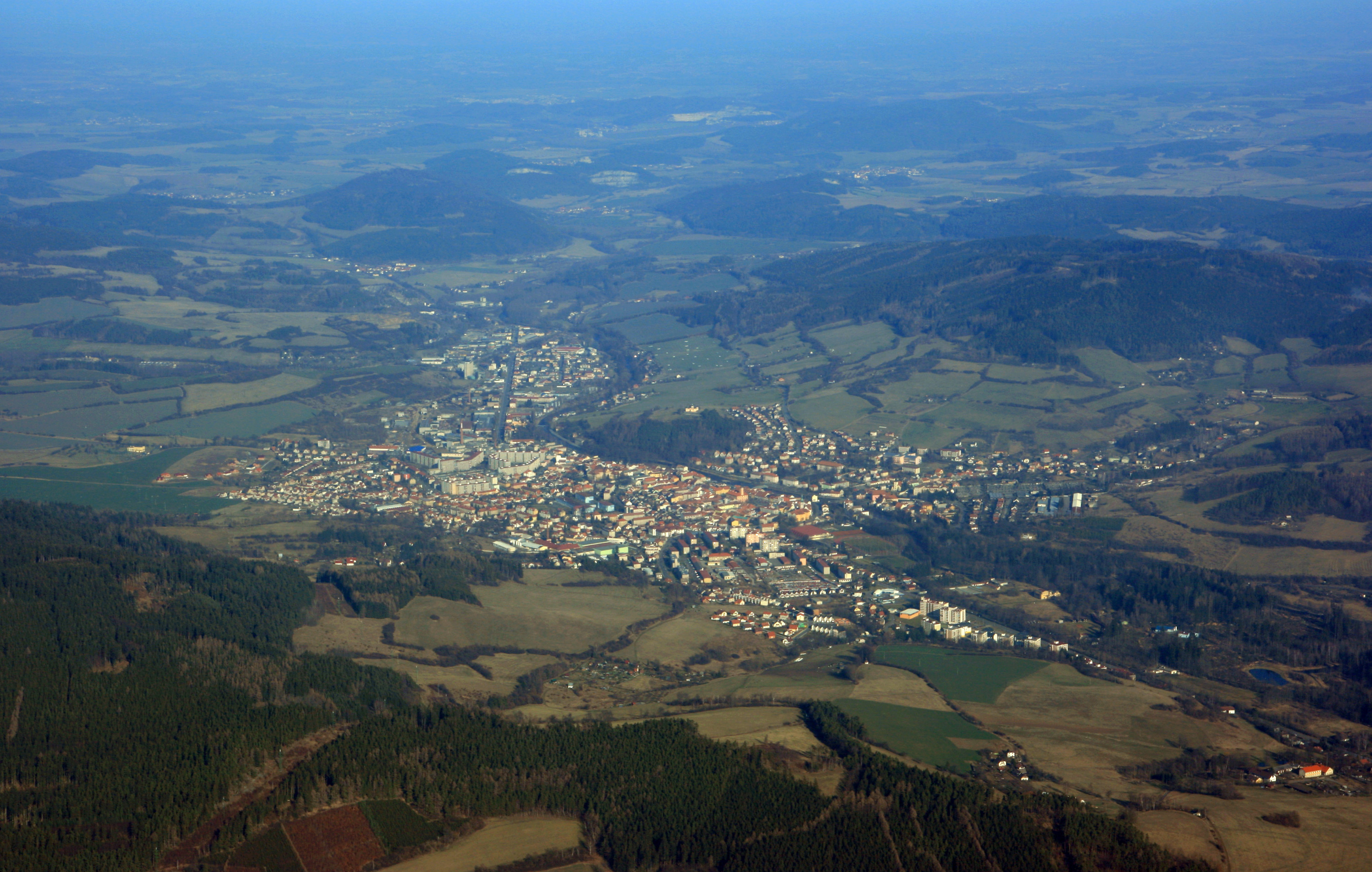 Letecký pohled na město Sušice od jihozápadu.